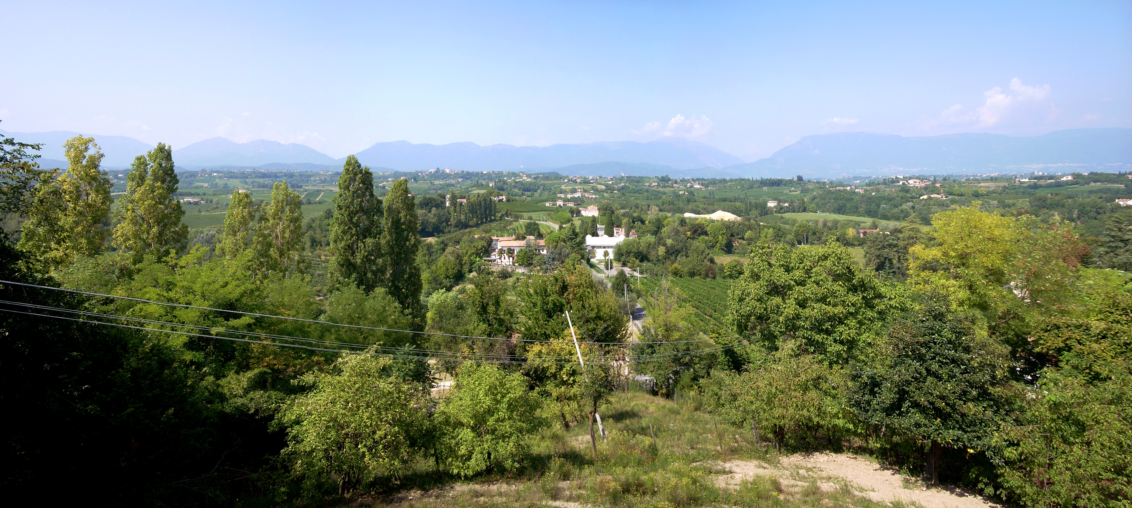 Panorama da Collalbrigo